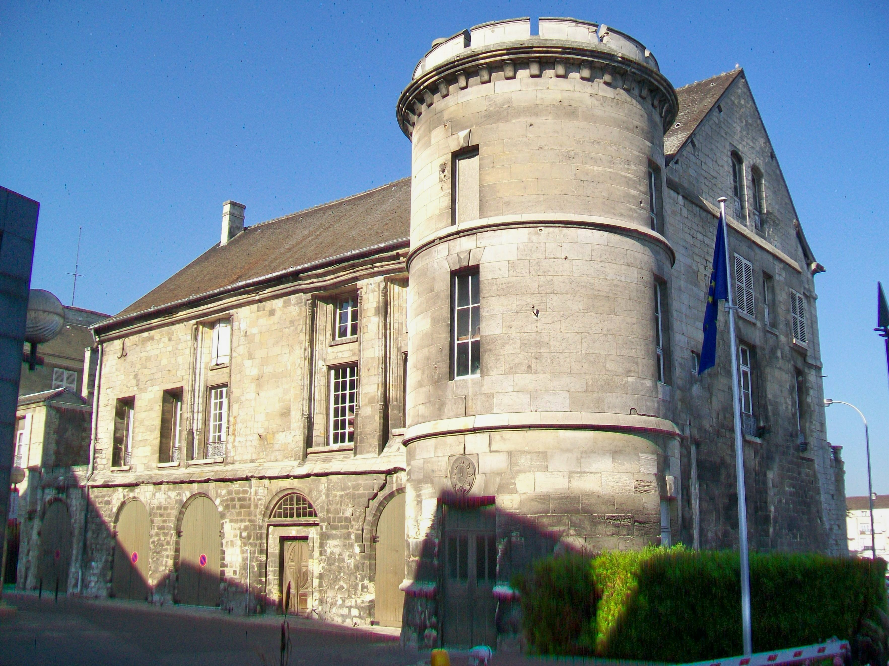 Maison construite au XIXe siècle sur les vestiges du château.